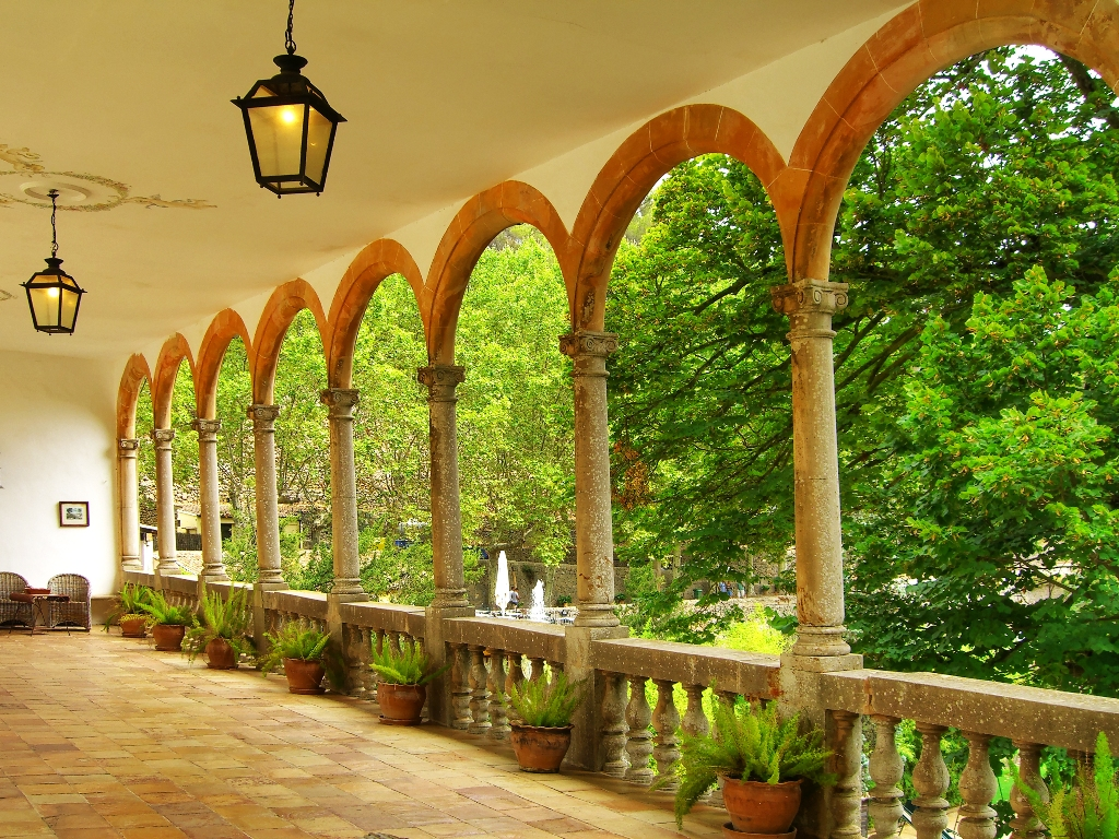 Terraza de La Granja (Esporles)